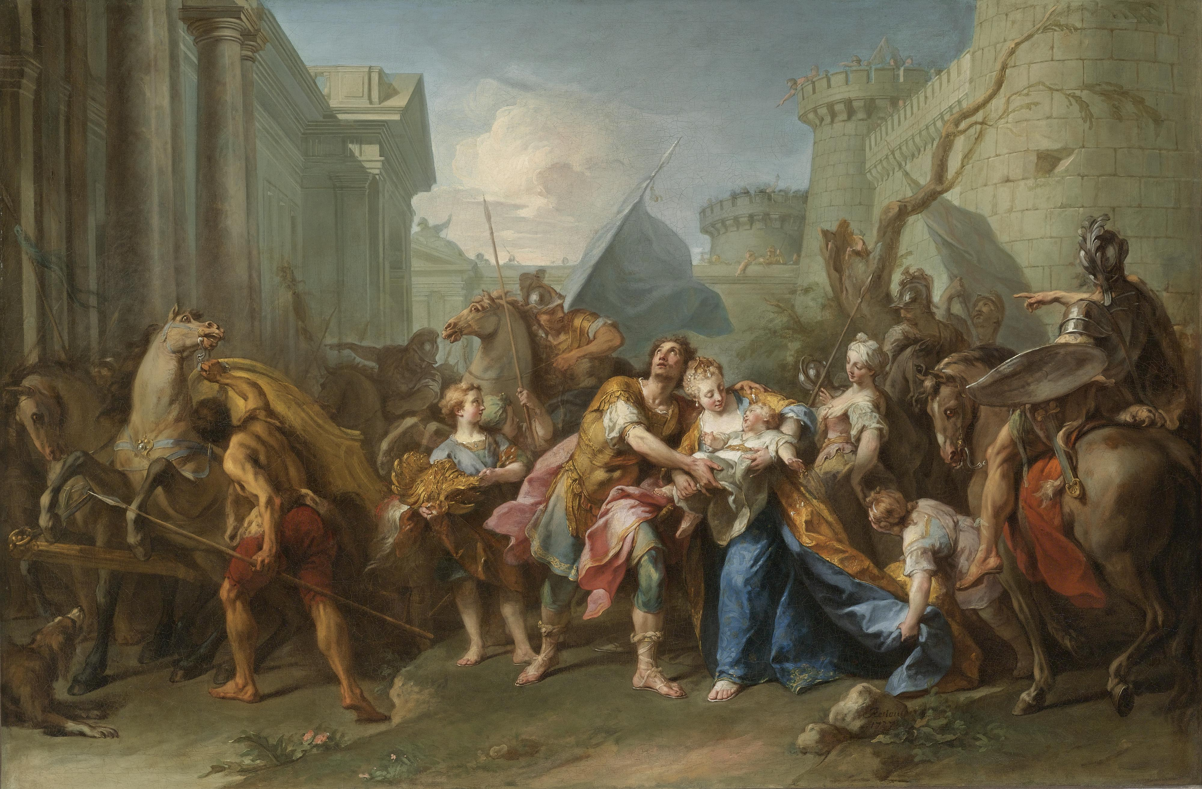 Les adieux d’Andromaque et d’Hector